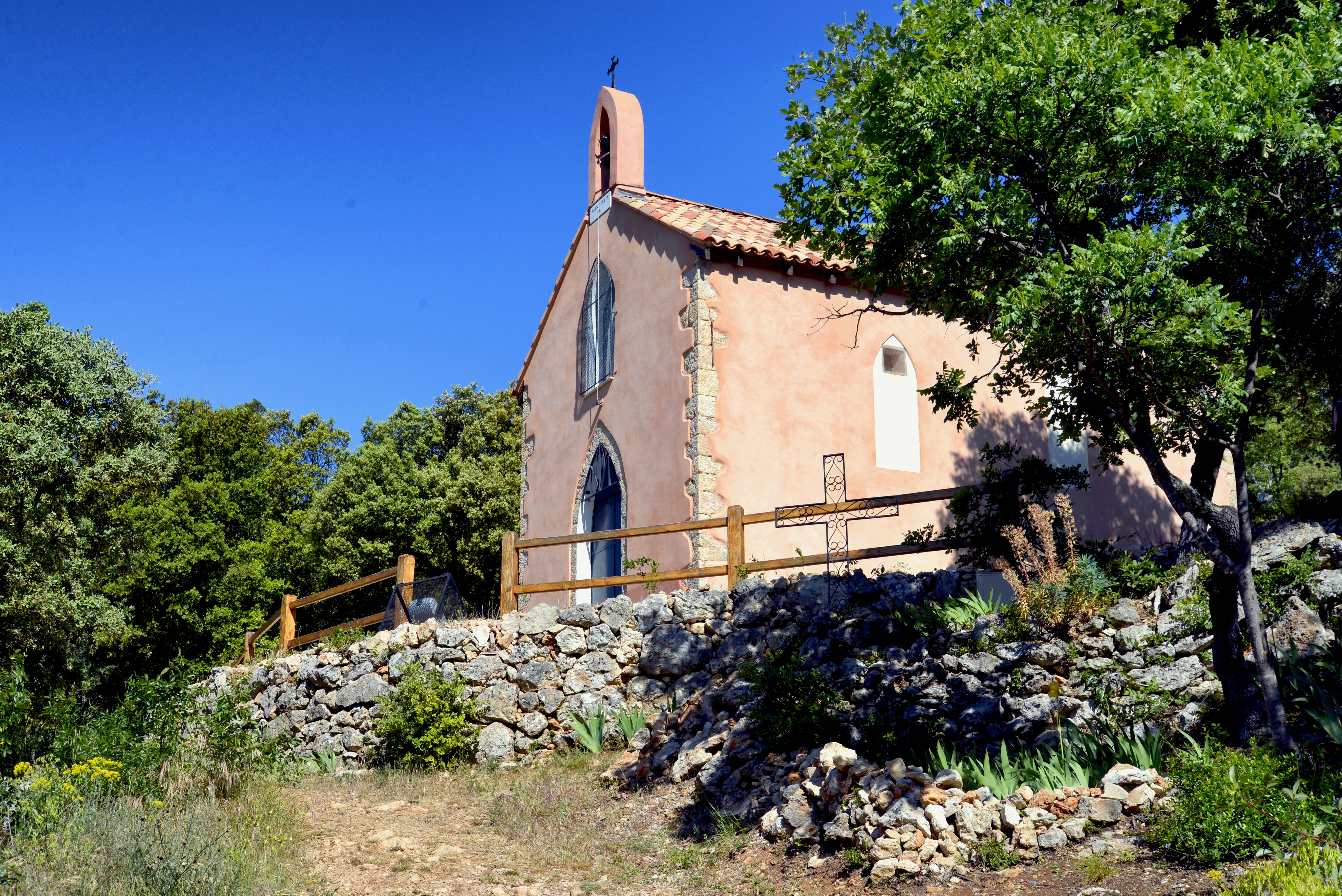 Garéoult, Provence (France) - Chapelle Saint-Félix, datée de 1885, restaurée en 2011